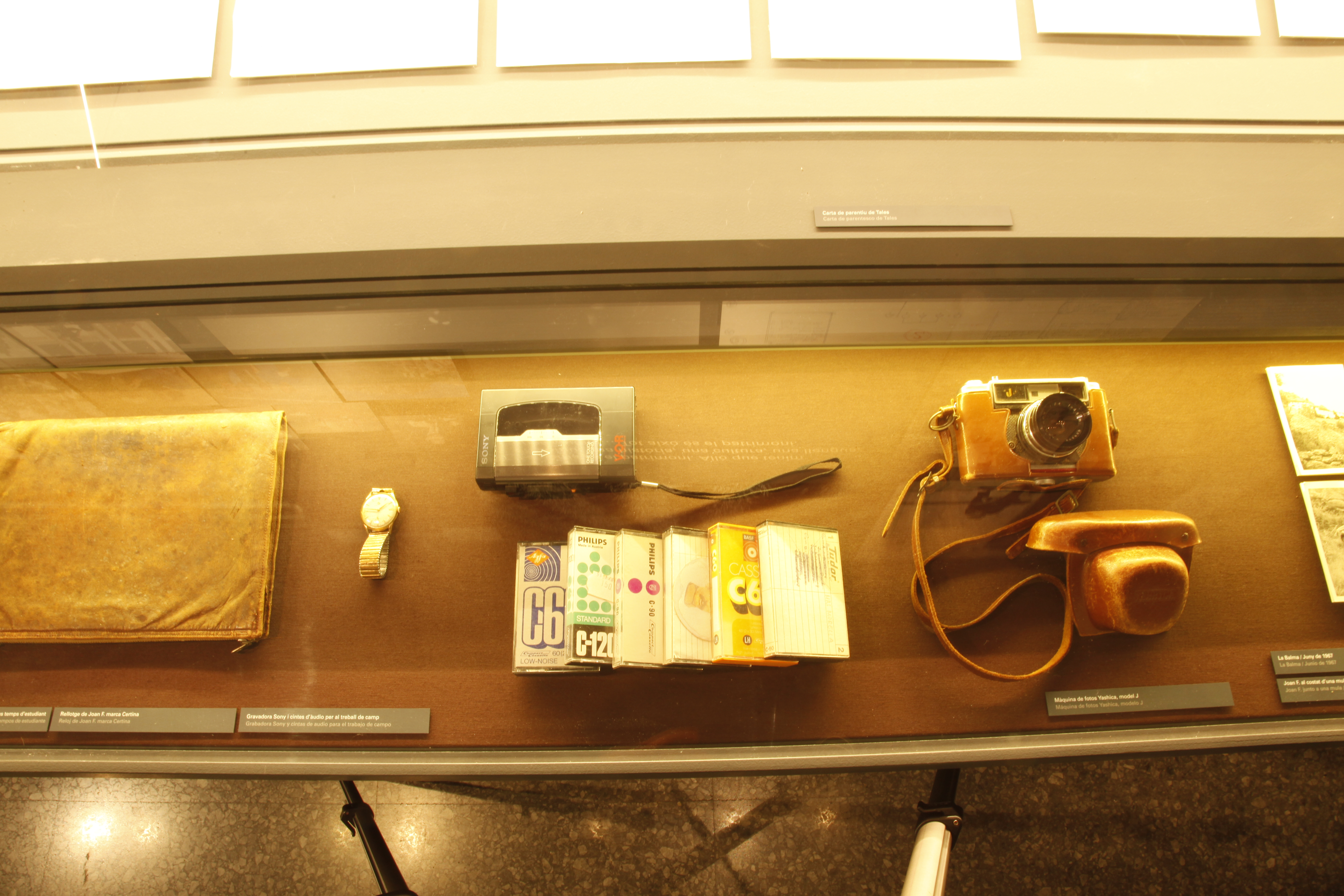 El Museu Valencià d'Etnologia ret homenatge a l'enorme llegat intel·lectual de Joan Francesc Mira amb aquesta exposició temporal.